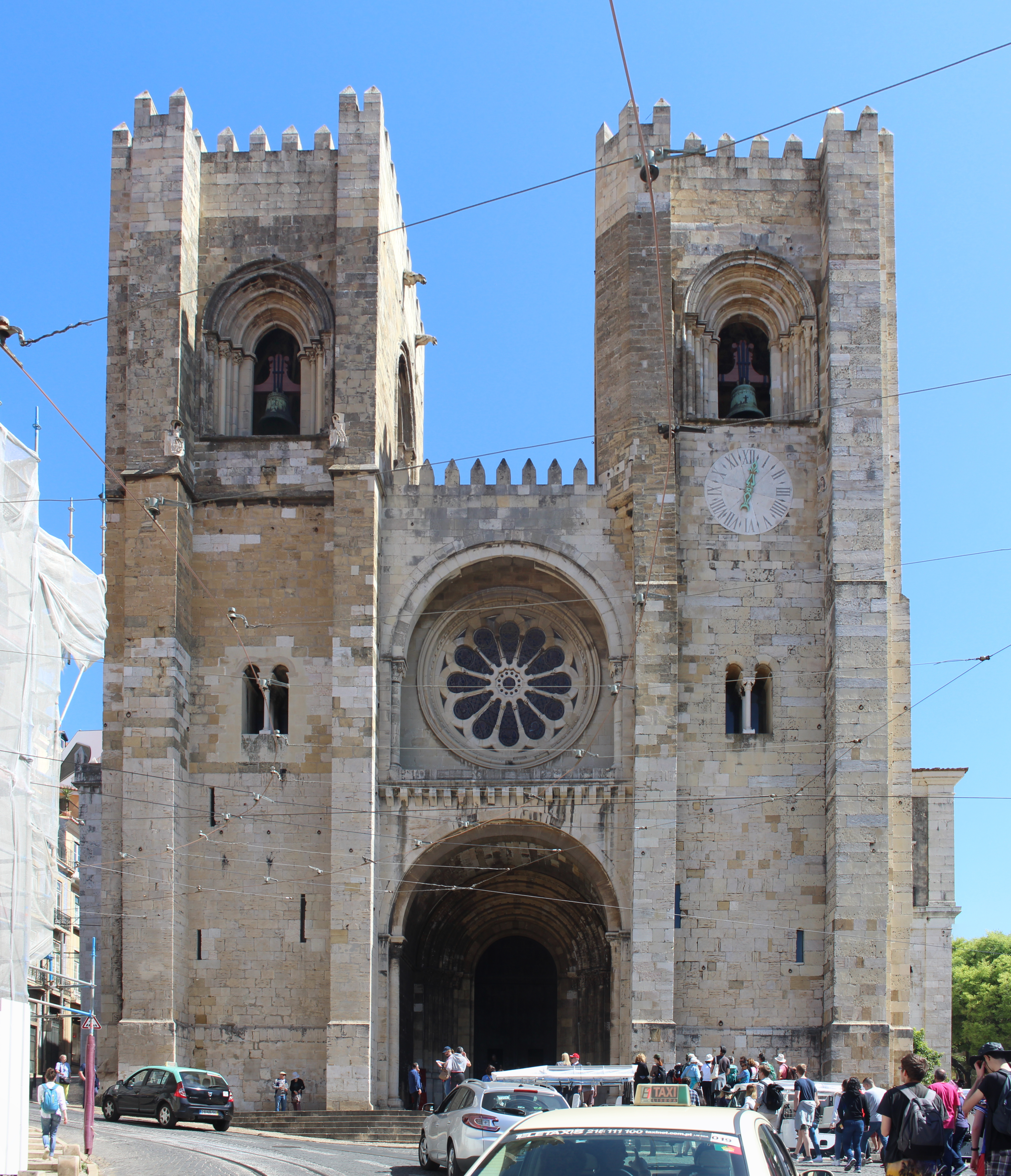 Cathédrale Santa Maria Maior de Lisbonne.